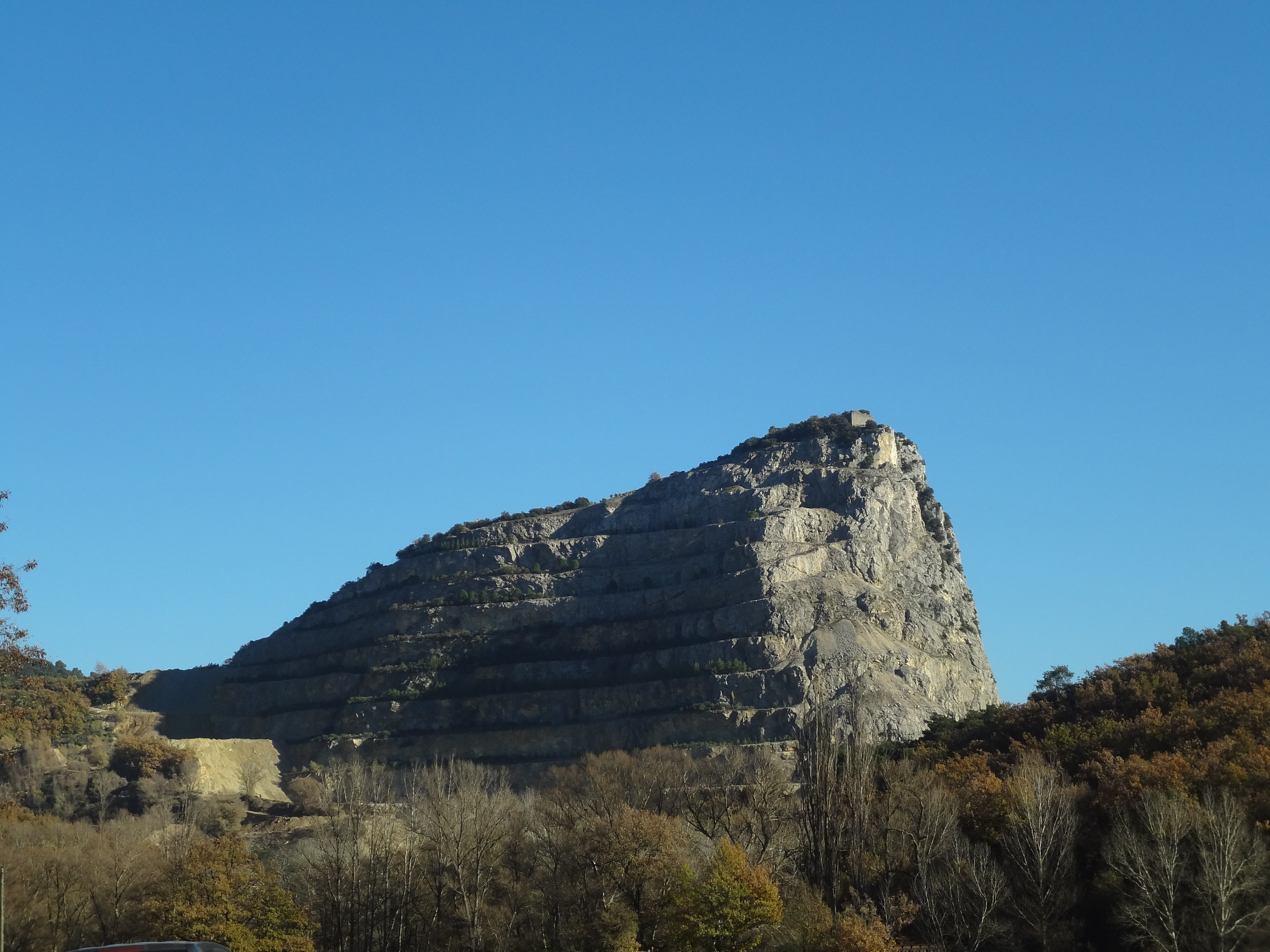 Carrière de calcaire de La Roque-Amère à Villeneuve